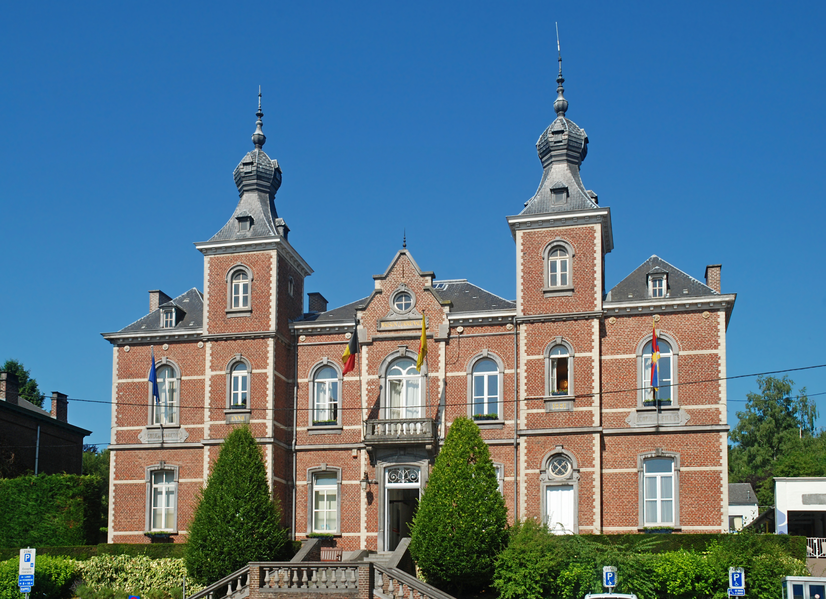 Belgique - Ottignies - maison communale